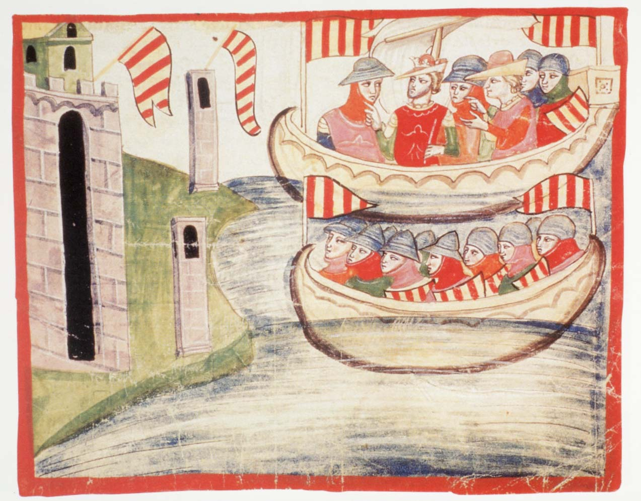 uova cronica. f.127r (1.VIII,69) ms. Chigiano L VIII 296. Viatge de Pere III d'Aragó envers Trapani (Sicília).